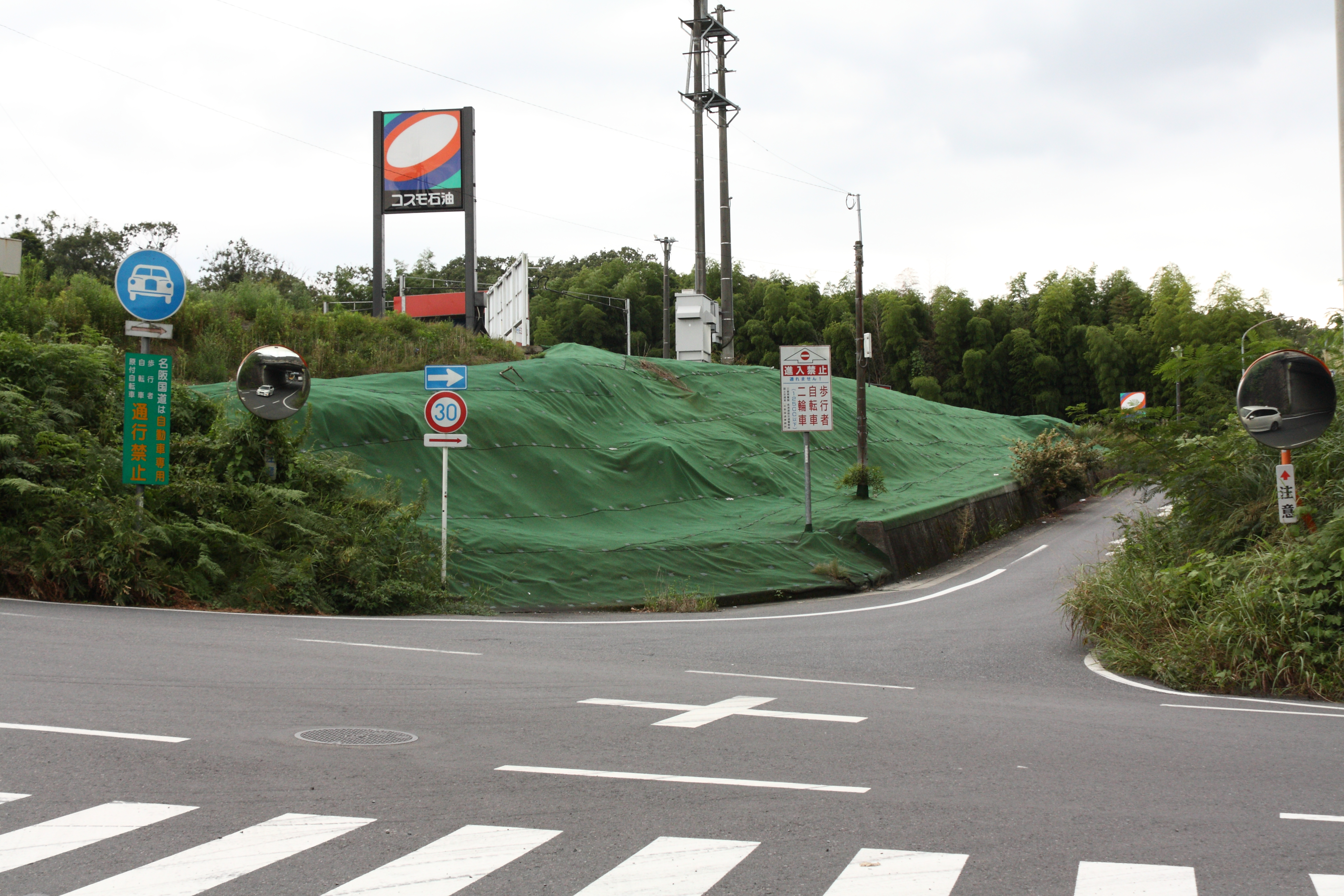 名阪国道 治田インターチェンジ（ダイヤモンド型） 天理方面入口 三重県伊賀市治田